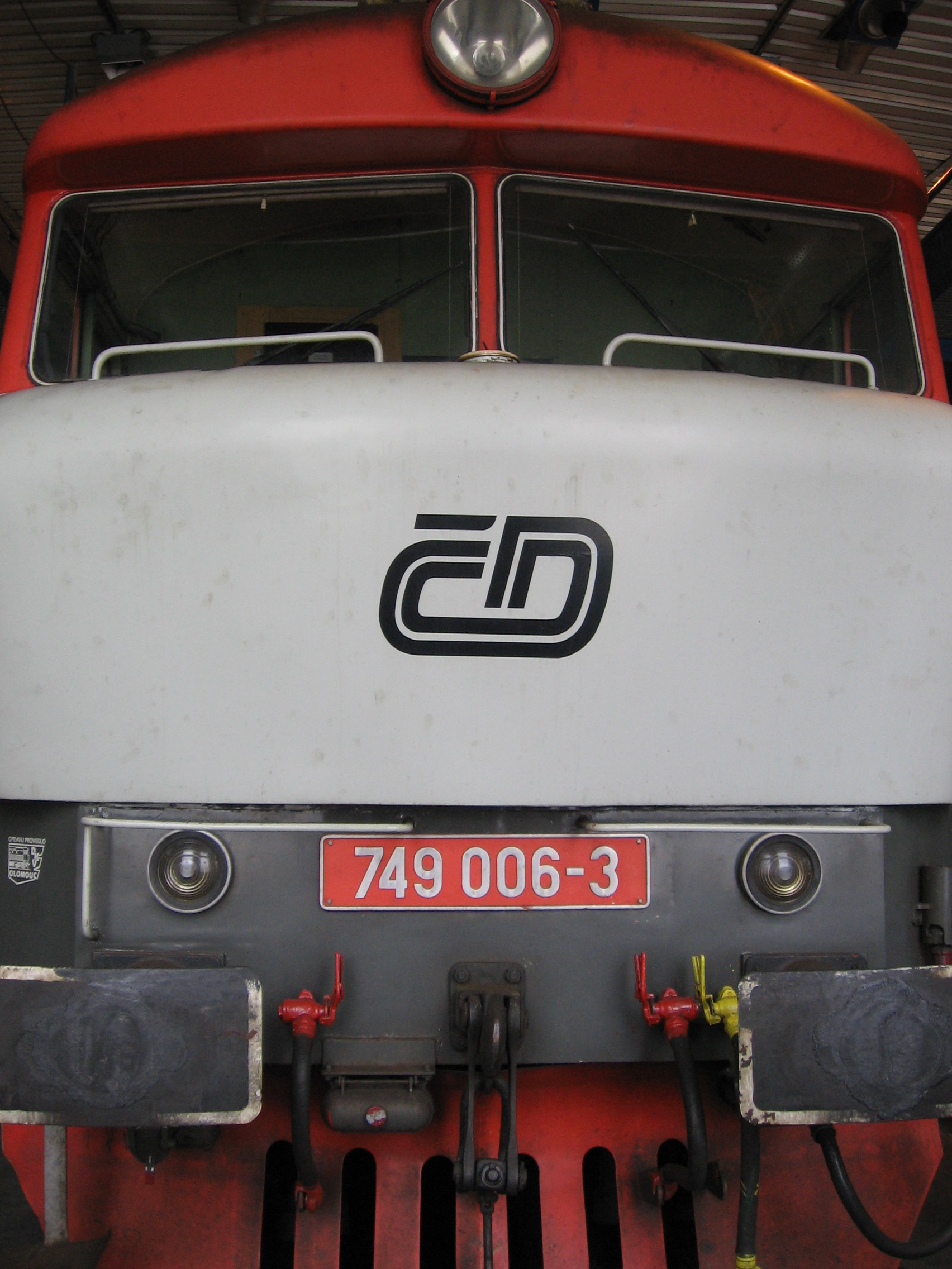 749.006 ve Vršovicích